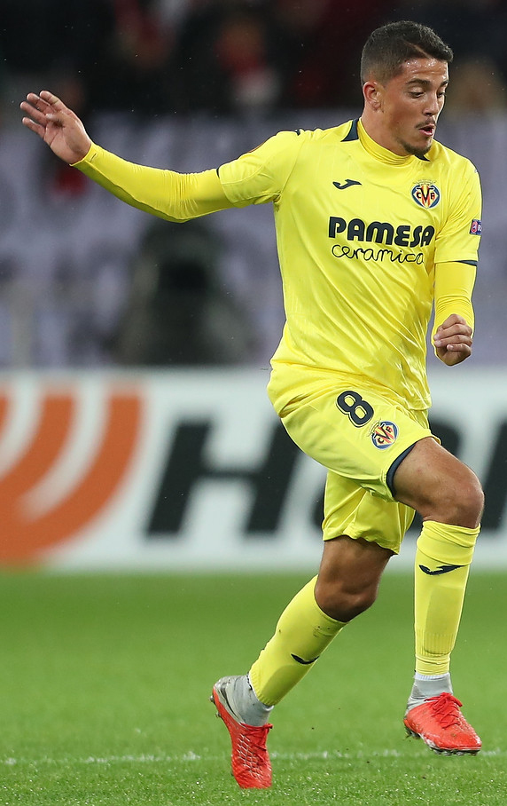 Битва на «Открытие-Арене». «Спартак» поделил очки с «Вильярреалом»